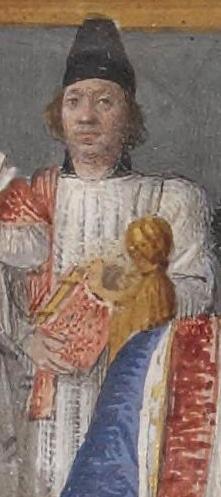 Un greffier de l'ordre de Saint-Michel, peut-être Jean Robertet. Détail de l'enluminure en frontispice des Statuts de l'ordre de Saint-Michel, exemplaire destiné à Louis XI.